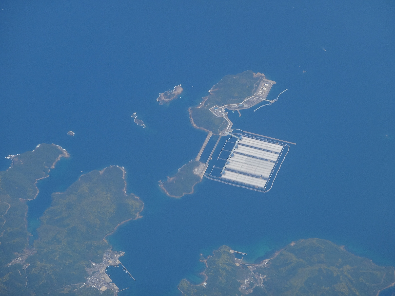 折島・柏島と、上五島国家石油備蓄基地 （2012年5月5日、ANA機から）